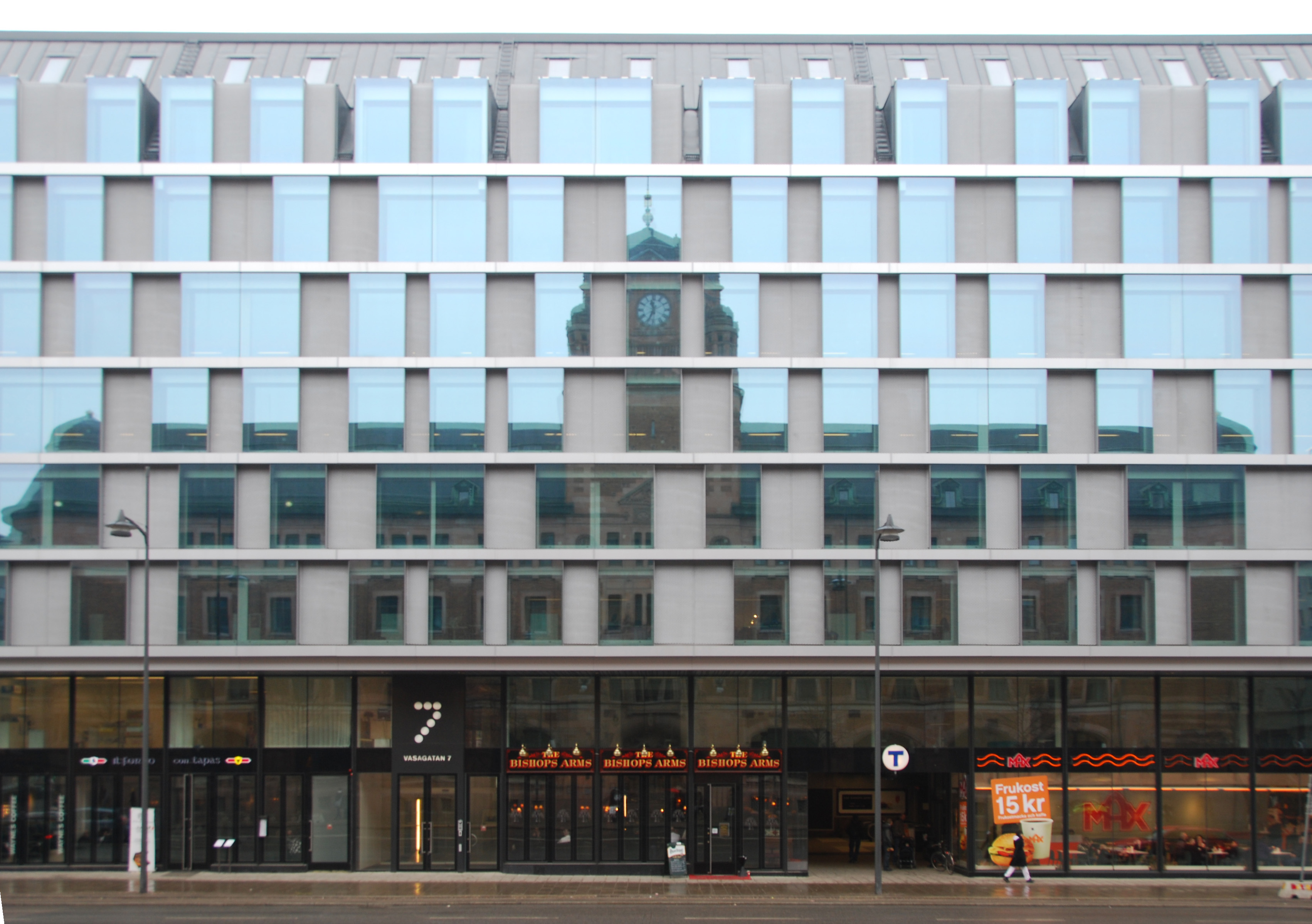 Centralposthuset i Stockholm speglas i motstående fasad